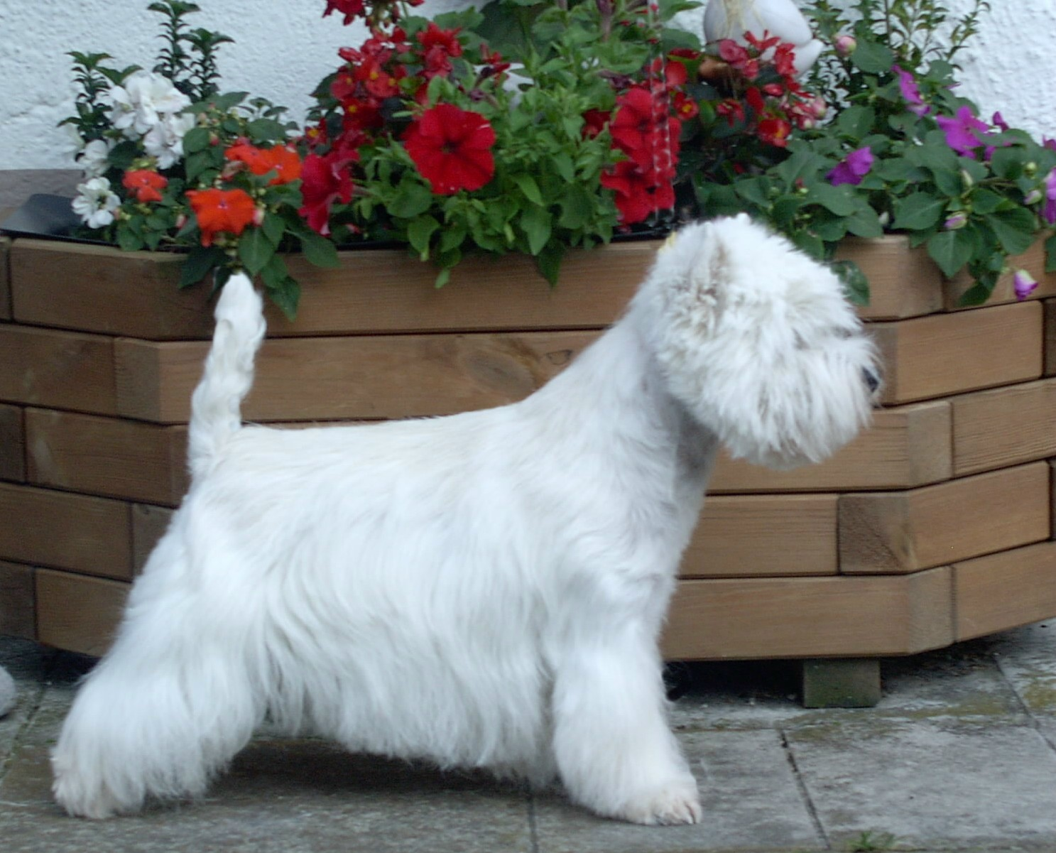 West Highland White Terrier -- Deutscher Champion Excalibur Brutus